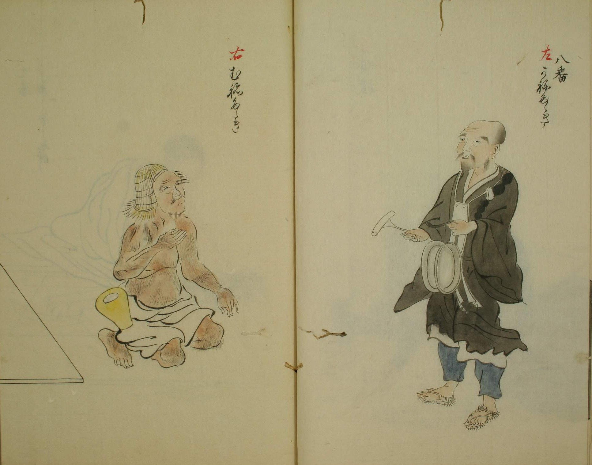 三十二番職人歌合』、垂恵 (?)、1494年、その1838年模写